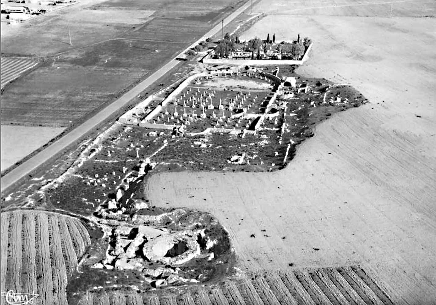 Carthage - La basilique de Damous Karita vue d'avion